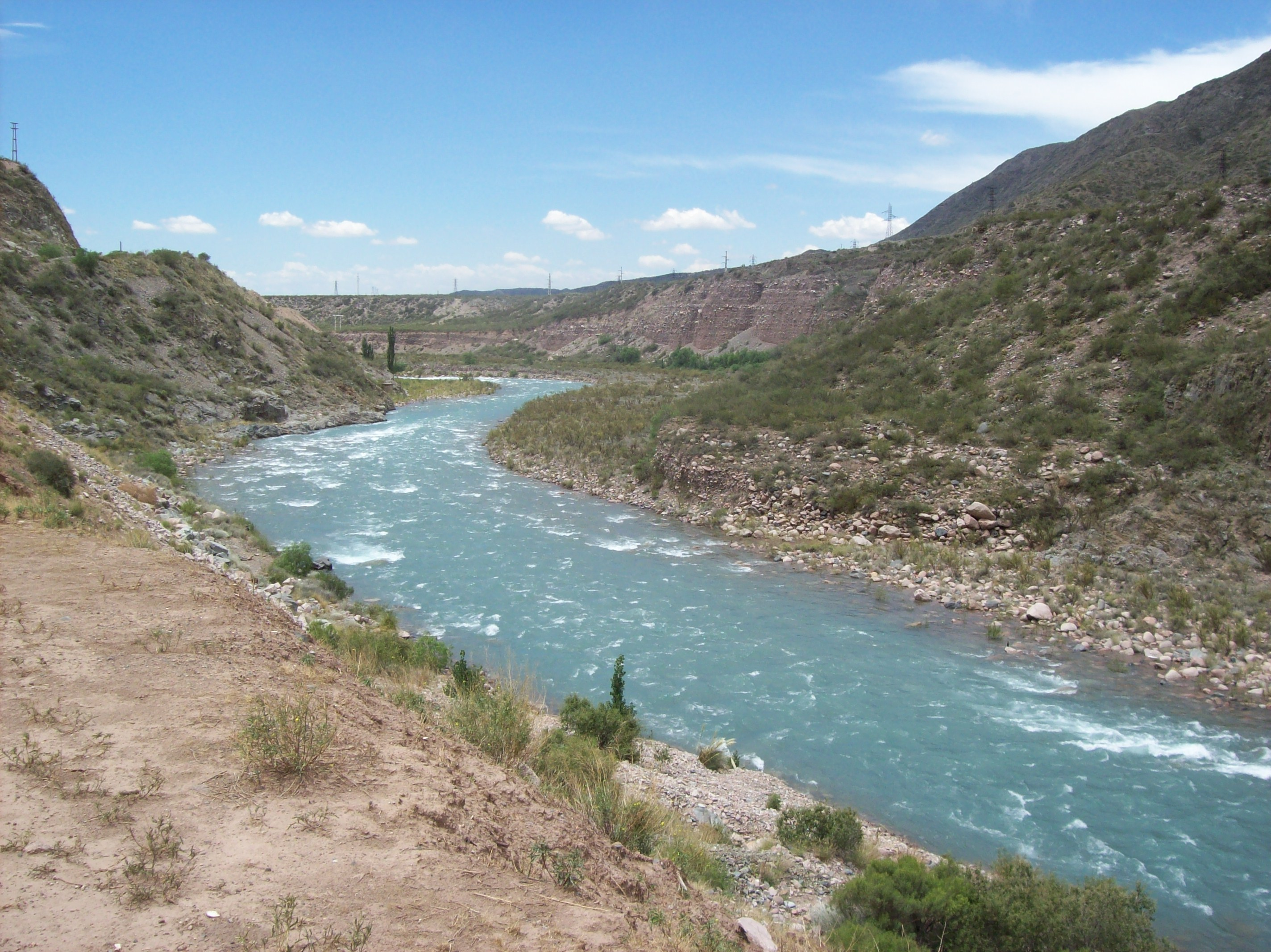 Río Mendoza al Este del túnel clausurado de la Ruta Provincial 82 en el Departamento Las Heras, Mendoza, Argentina.